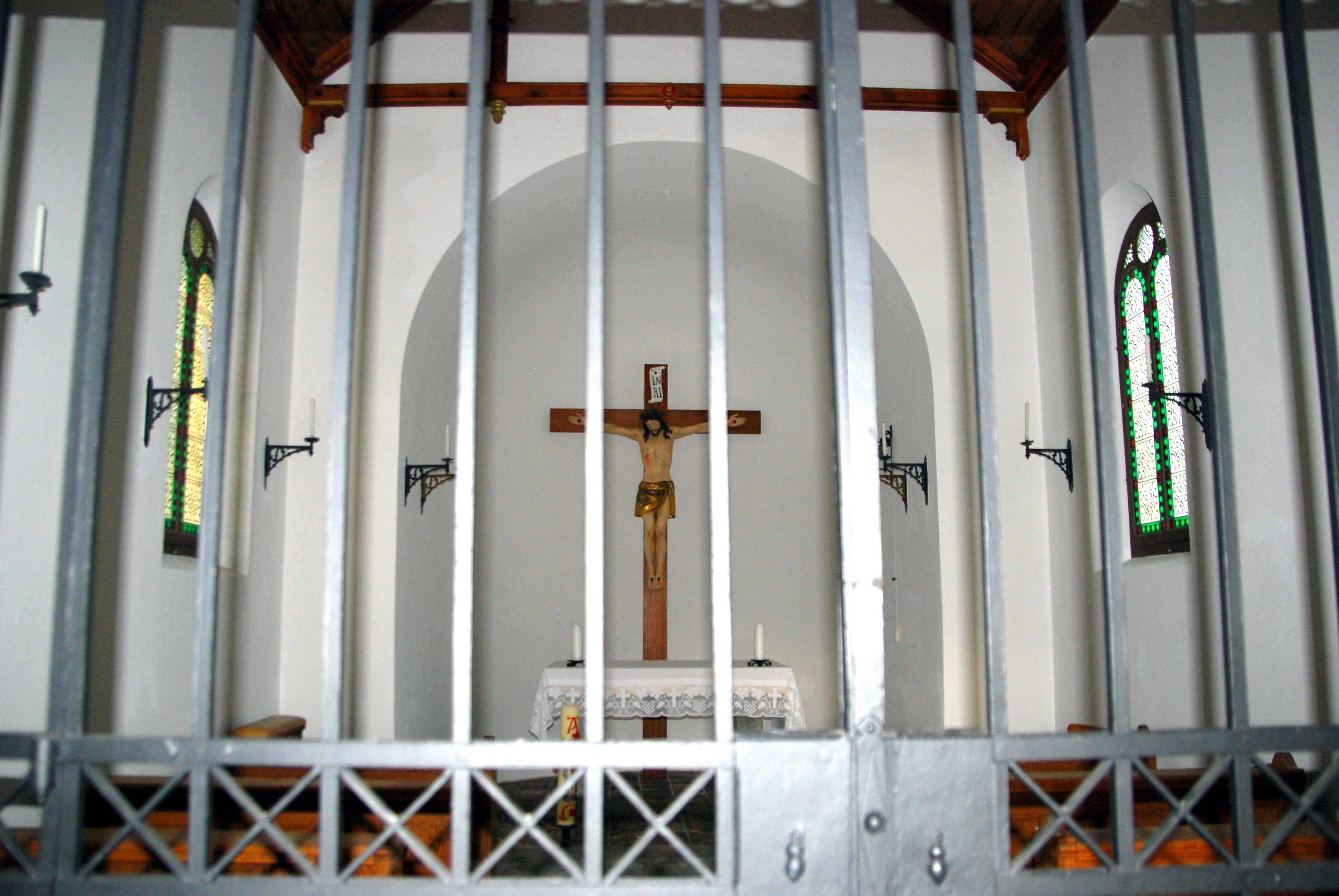 Andechs, OT Erling, Friedenskapelle, Innenansicht.